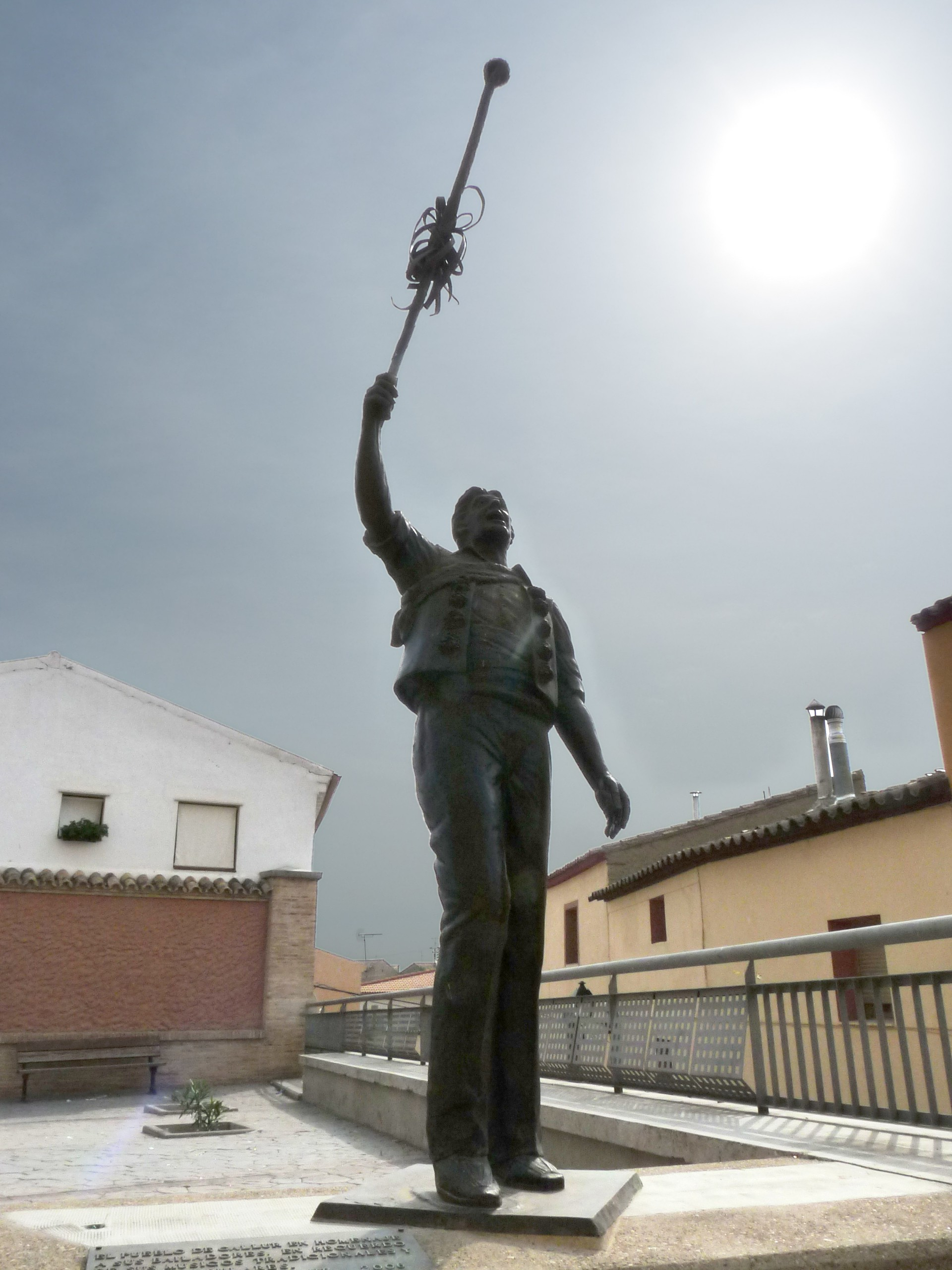 Gallur - Homenaje a los bailadores: "El pueblo de Gallur en homenaje a sus bailadores. En recuerdo de sus músicos tradicionales y dichos populares. Gallur 2006"